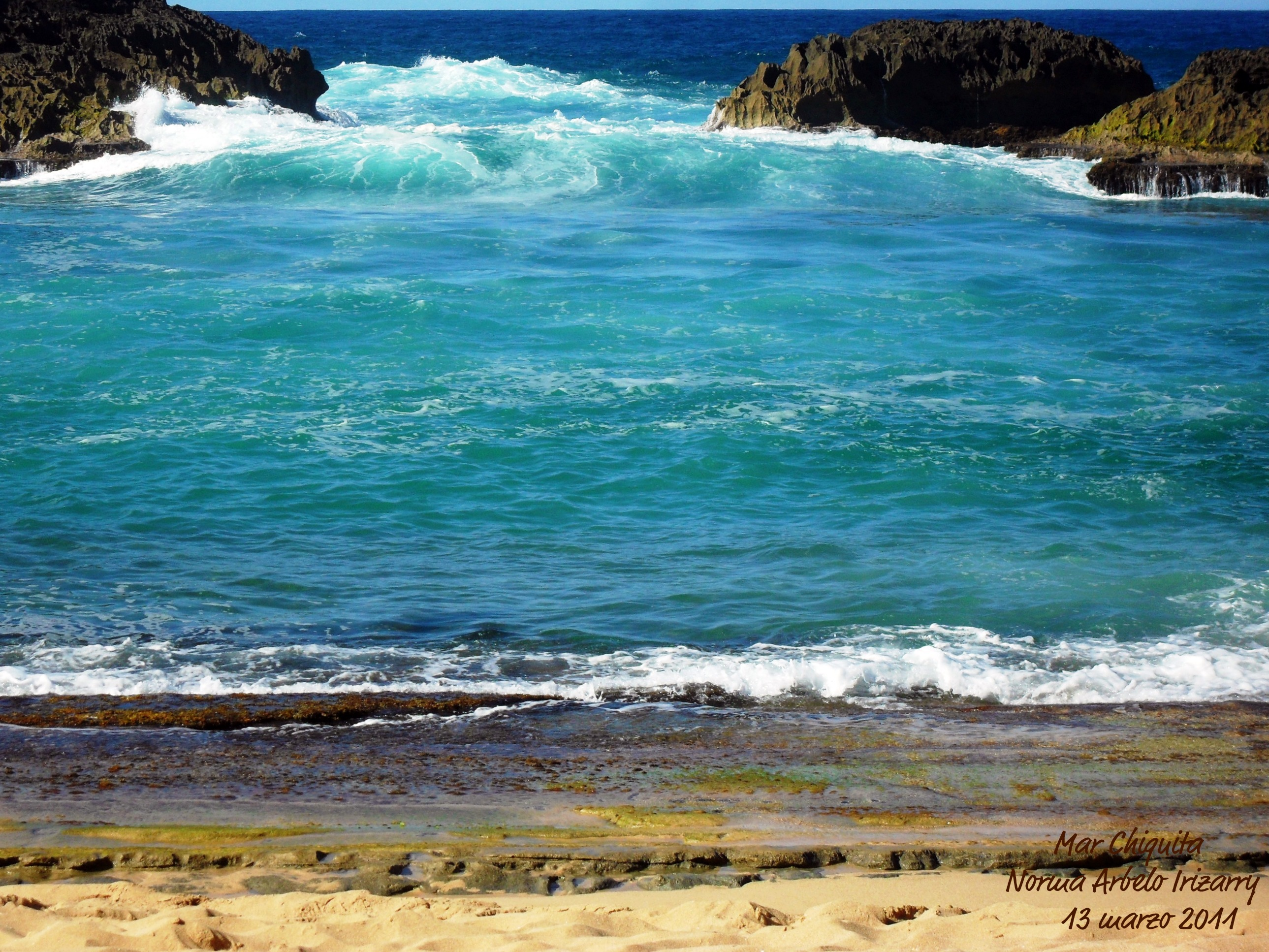 Marc Chiquita - Manati, Puerto Rico